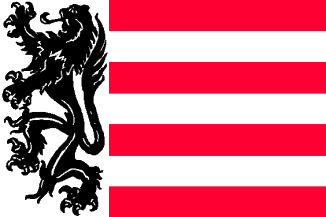 Drapeau de l'ancienne commune de Sas-de-Gand